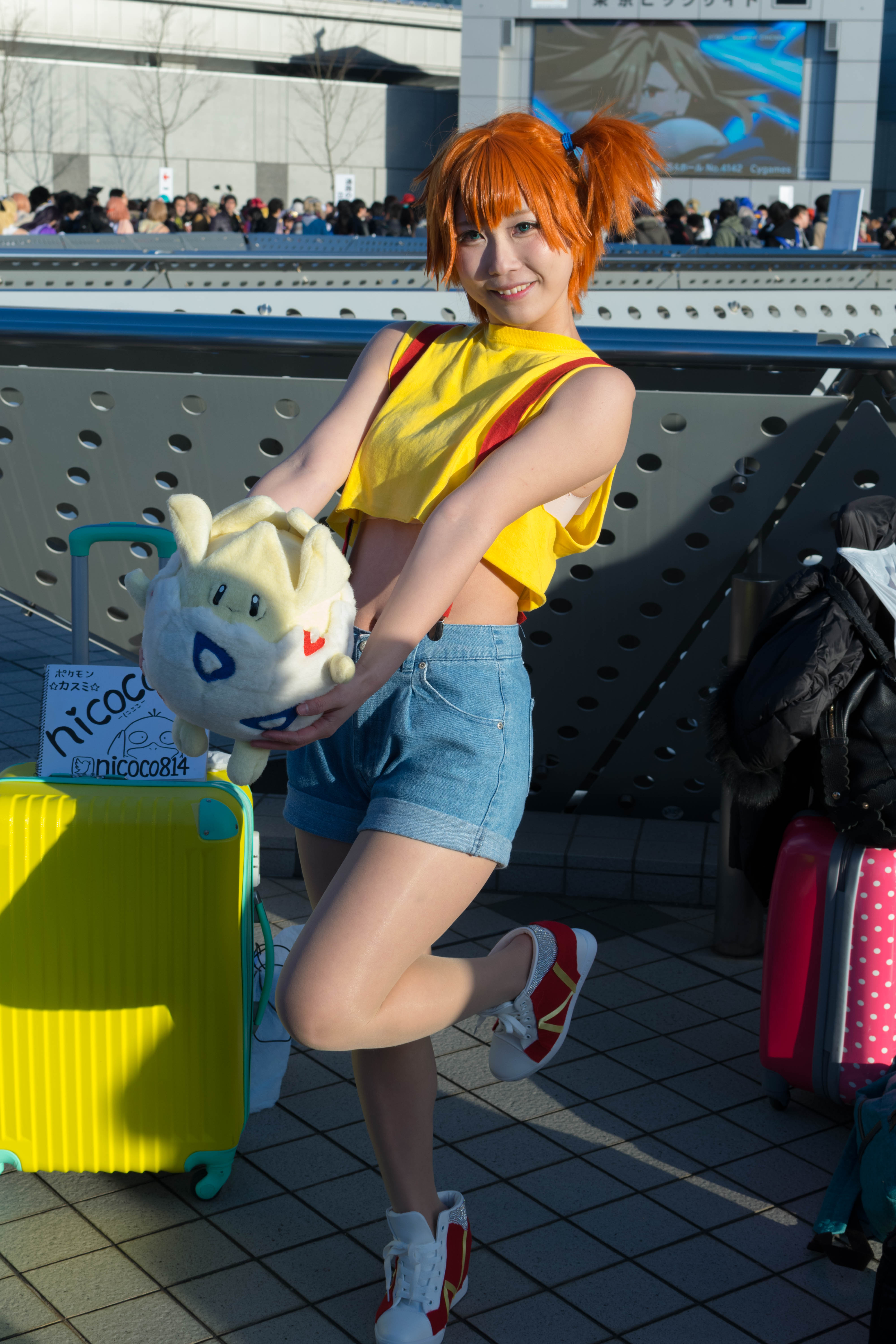 Misty